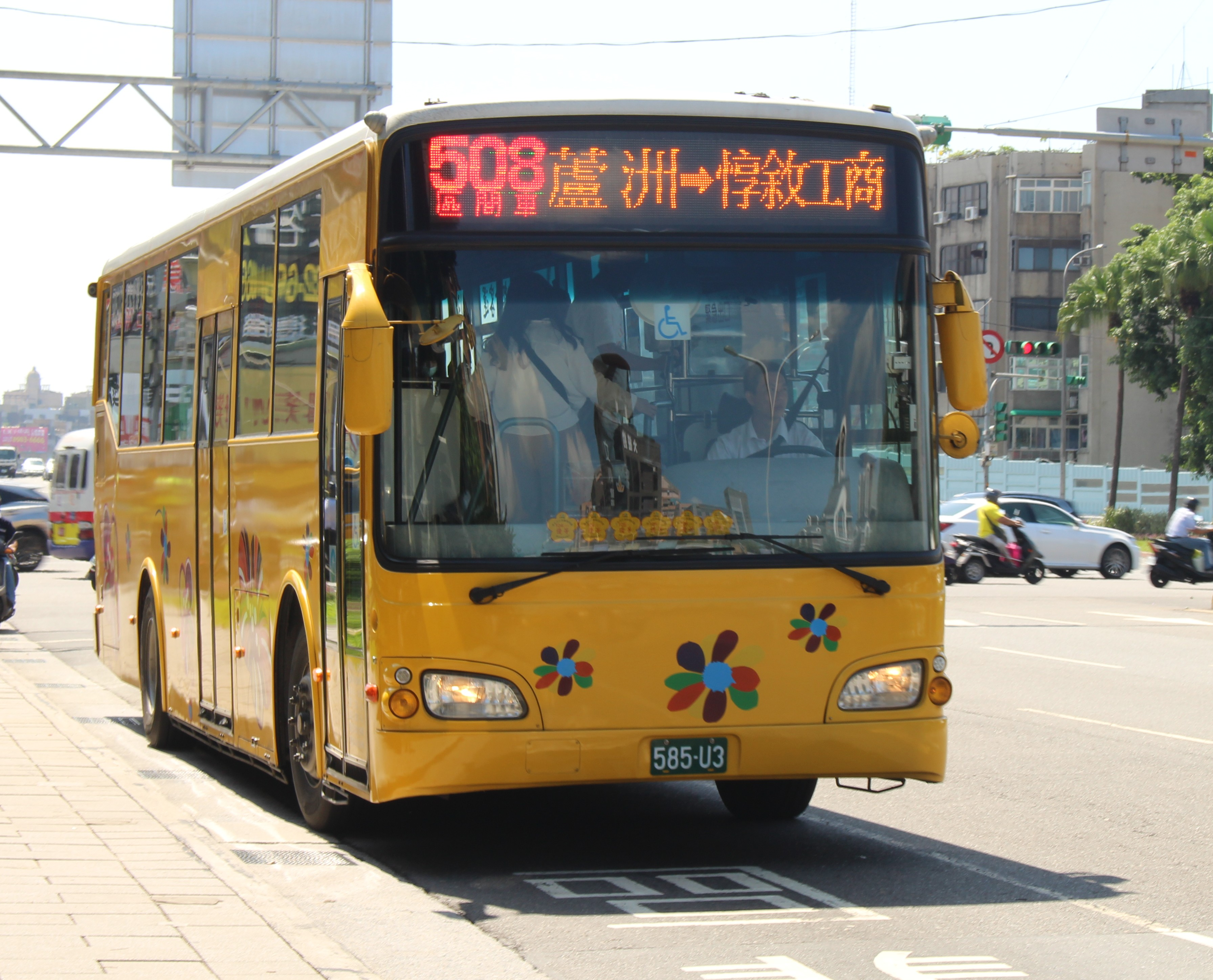 大都會客運585-U3 508區間車復康巴士HINO RK8JRVA